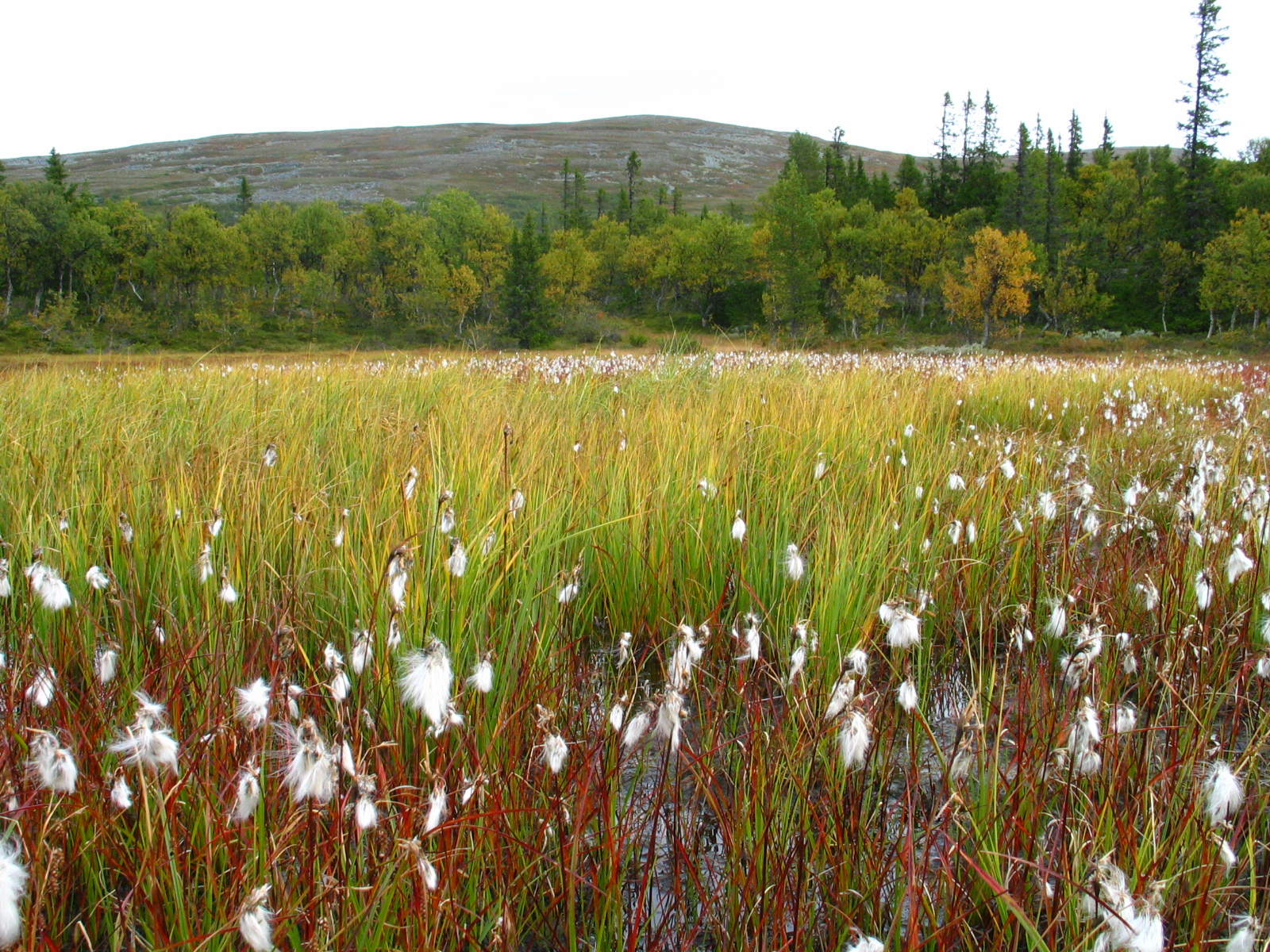 En myr i Arådalen